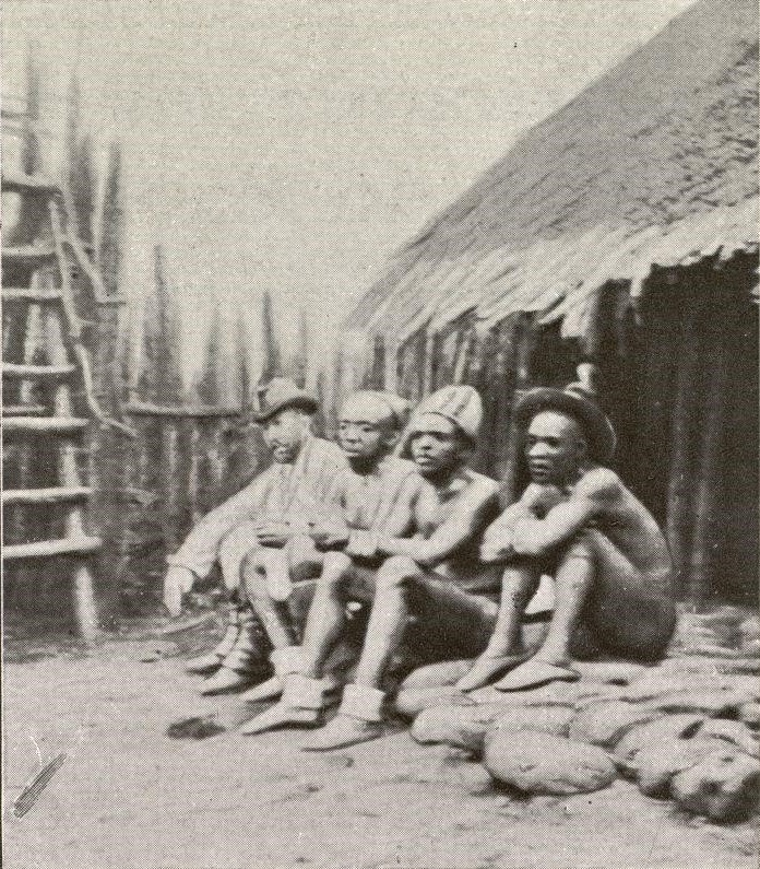 De izquierda á derecha: Joaquín Coll y Astrell; Bioko, el botuco o gobernadorcillo de más prestigio en la isla; Malabbo, rey de los bubis o indígenas de Fernando Póo, y Alobari, sucesor del rey